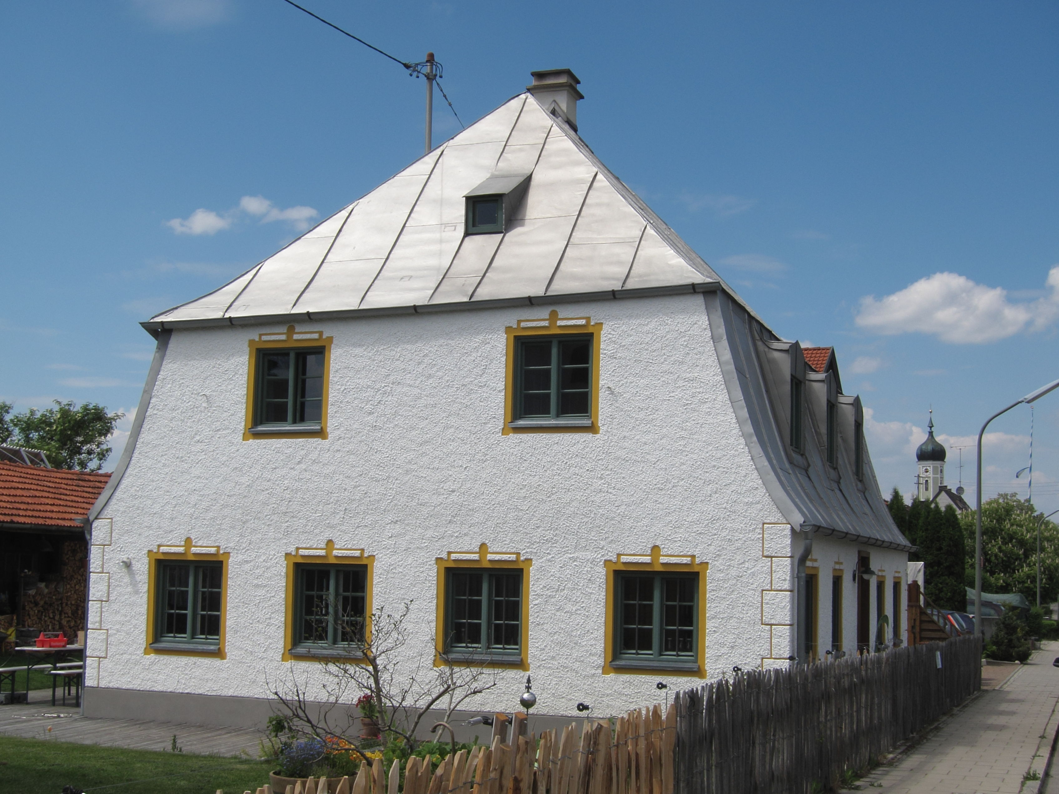 Bucher Str. 22; Wohnhaus, biedermeierlicher erdgeschossiger Bau mit Mansardwalmdach, um 1820/30.